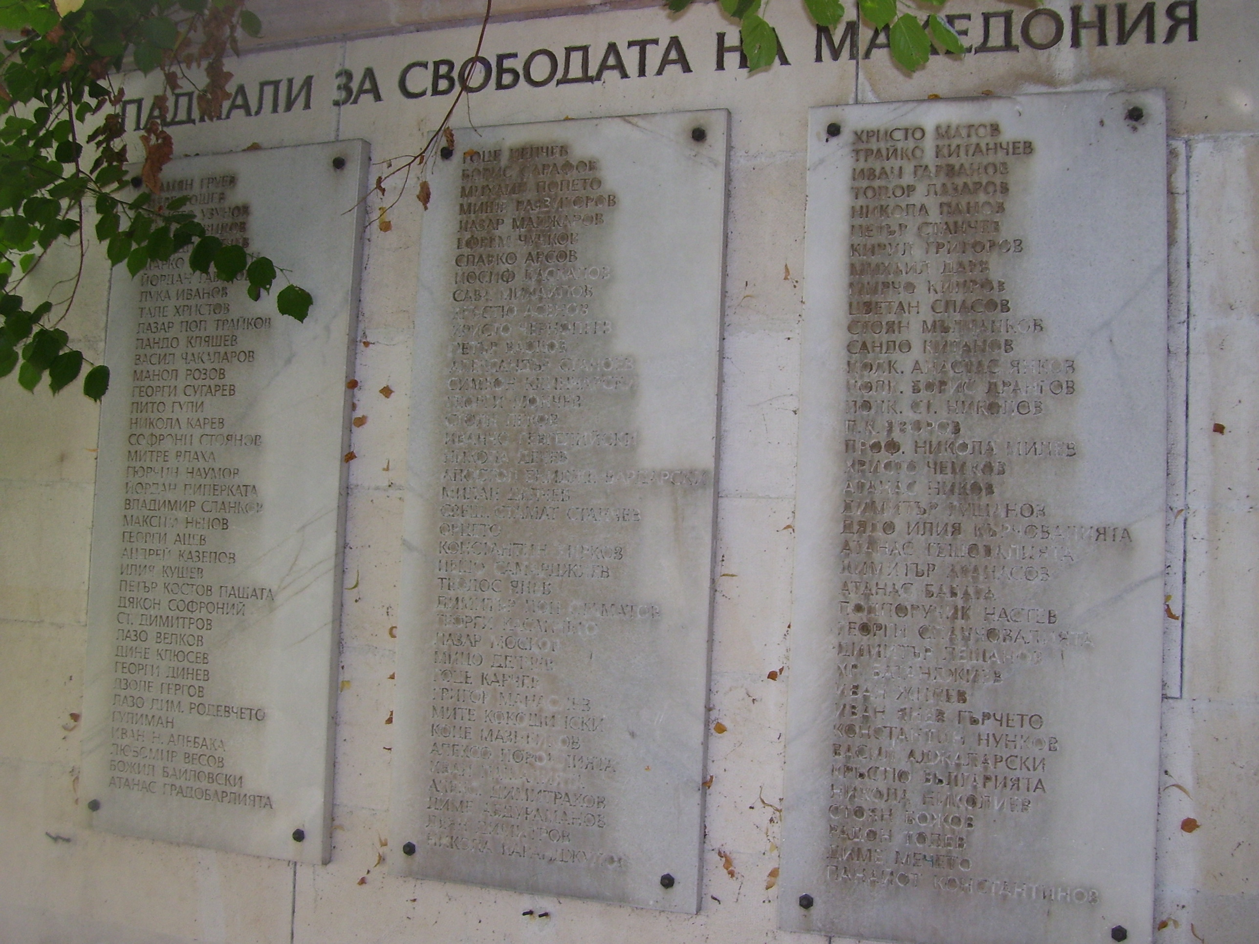 Паметникът на Тодор Александров в Кюстендил отзад.